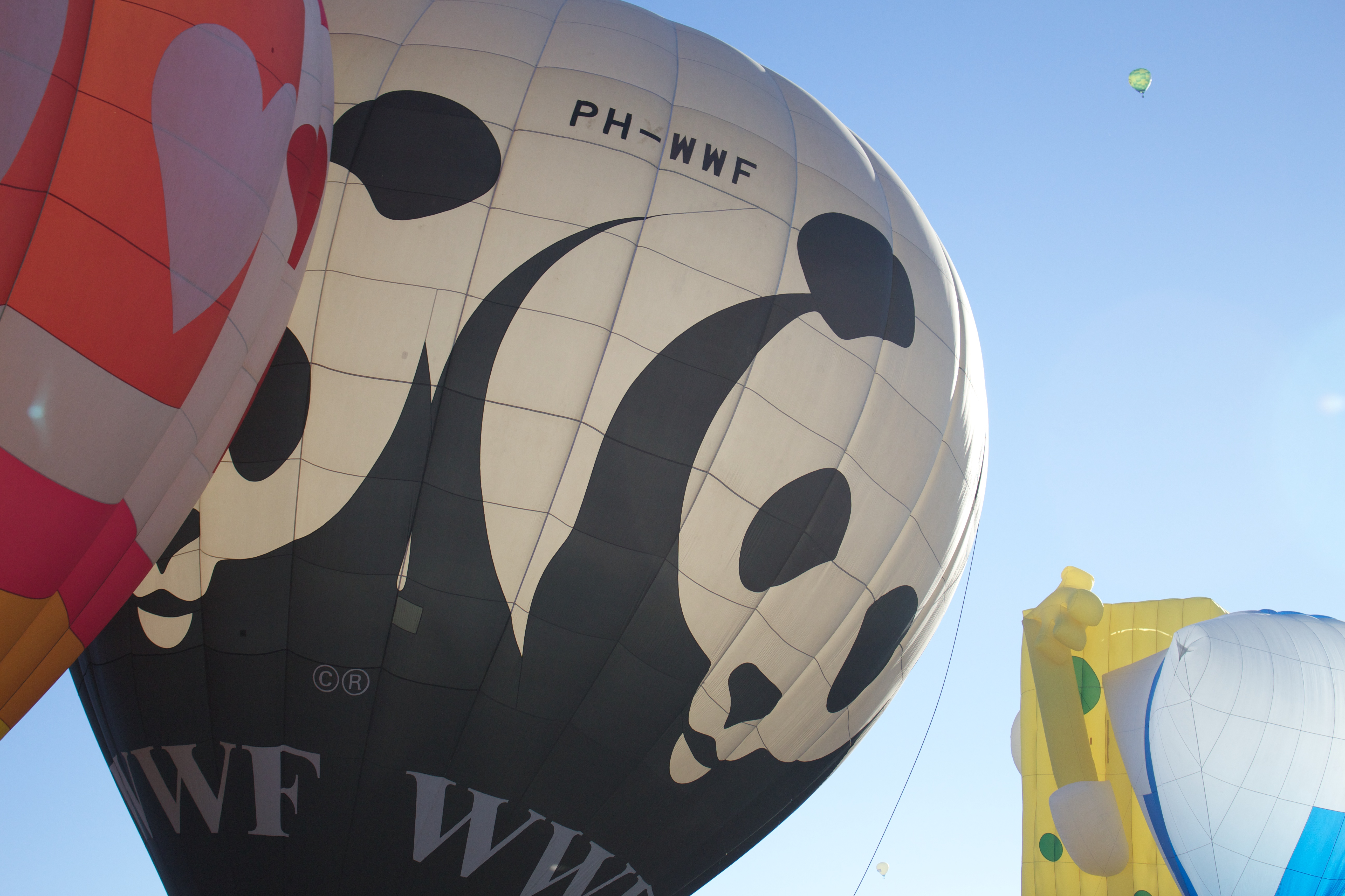 FIG 2013 WWF panda